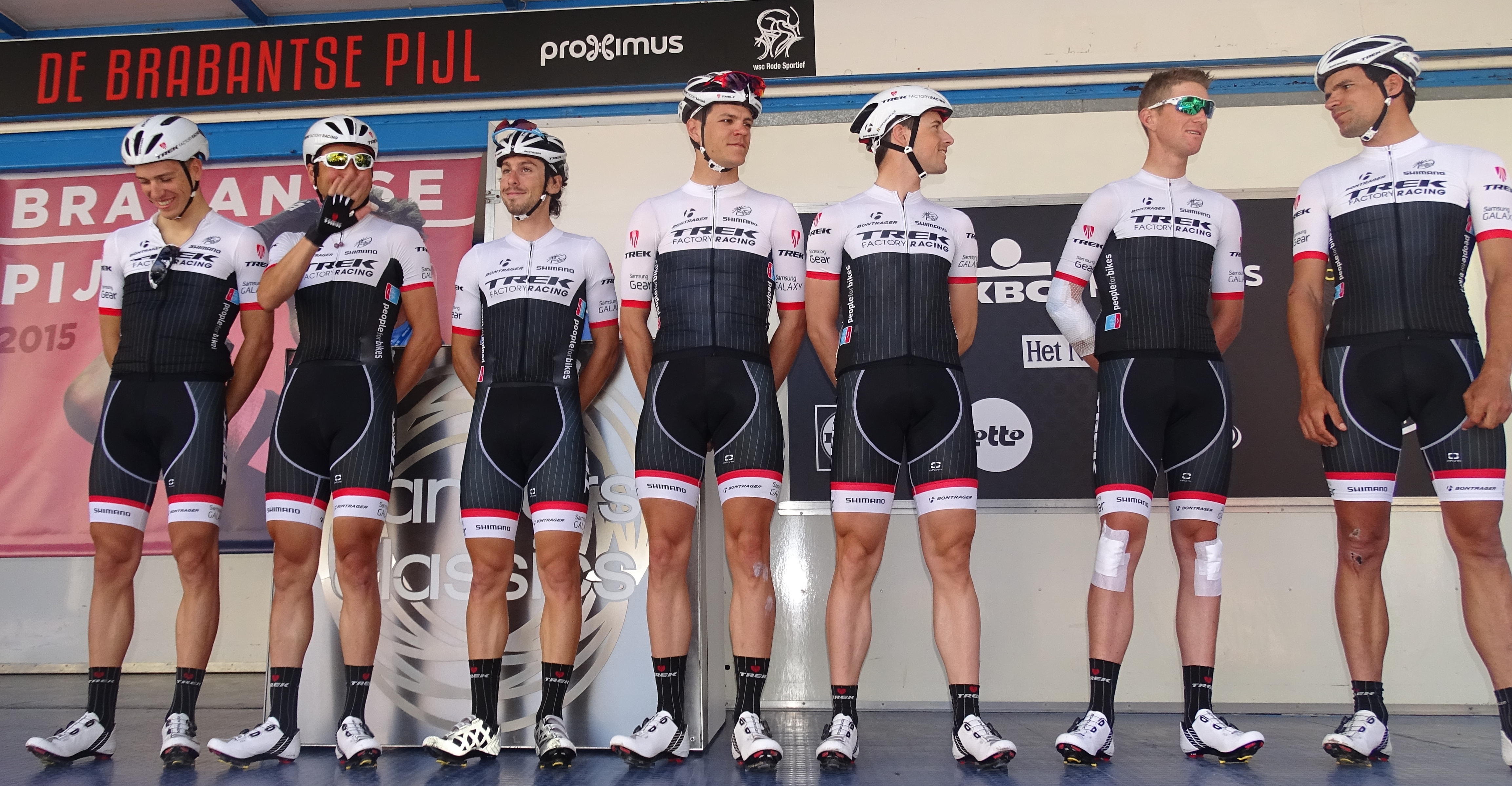 Reportage réalisé le mercredi 15 avril à l'occasion du départ de la Flèche brabançonne 2015 à Louvain, Belgique.